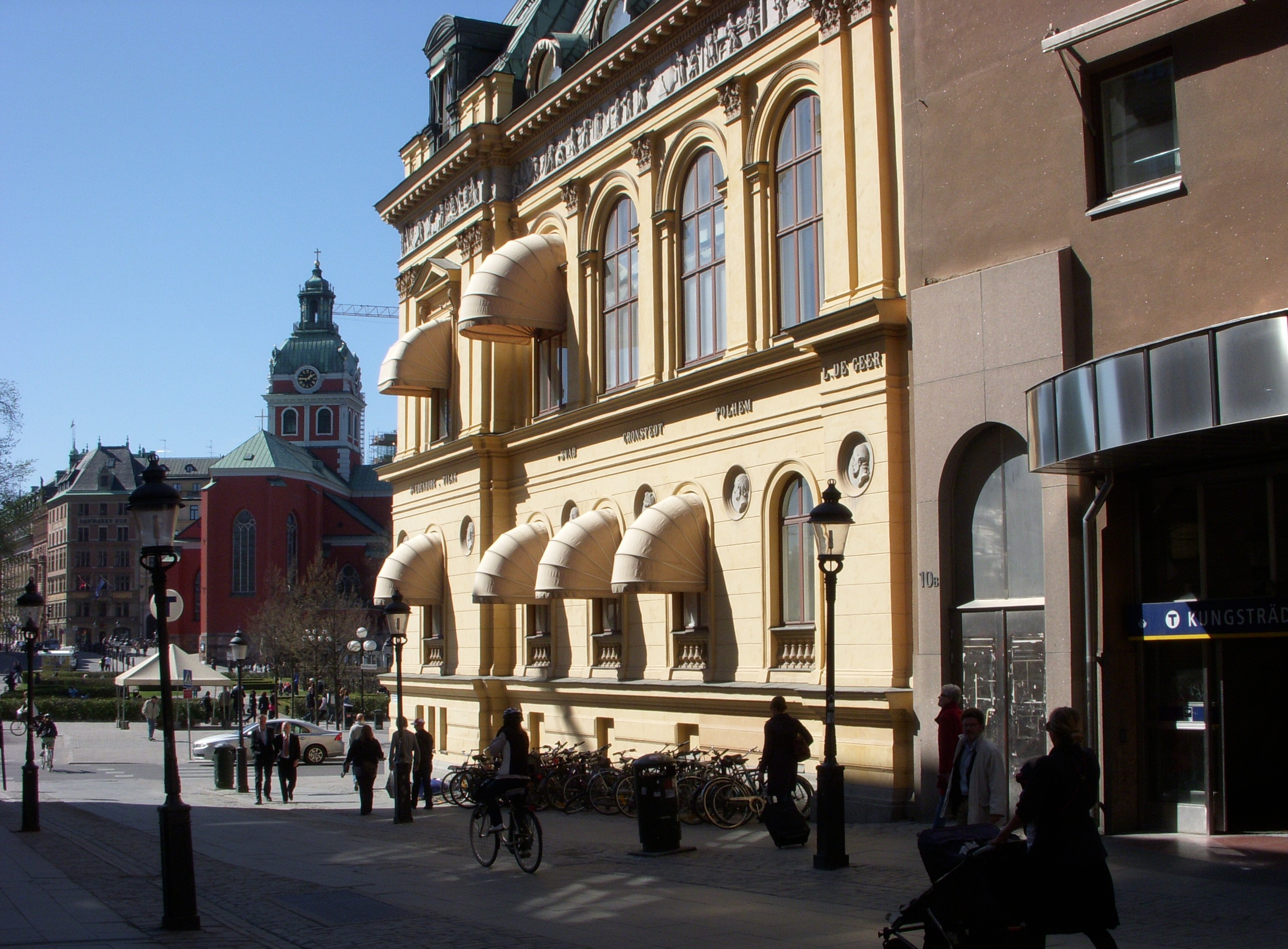 Arsenalsgatan på Blasieholmen i Stockholm